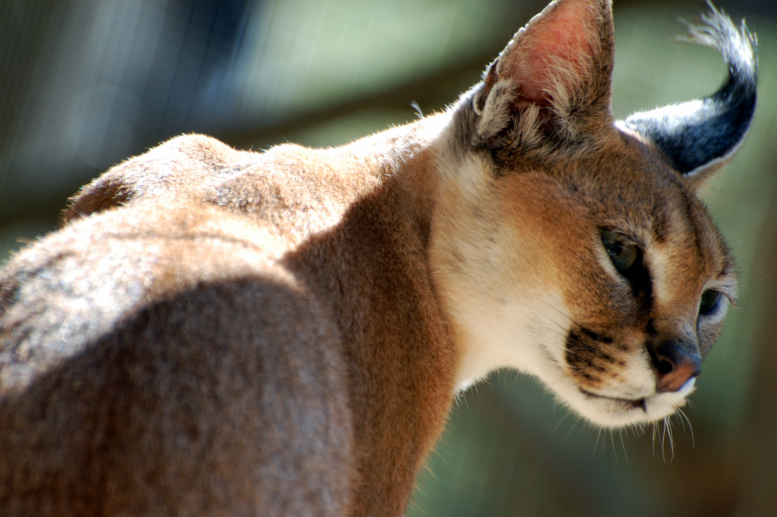 Caracal (Caracal caracal) au zoo de San Diego